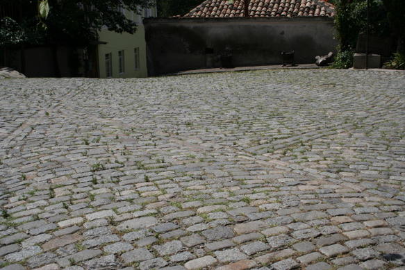 Tbilisi, Georgia